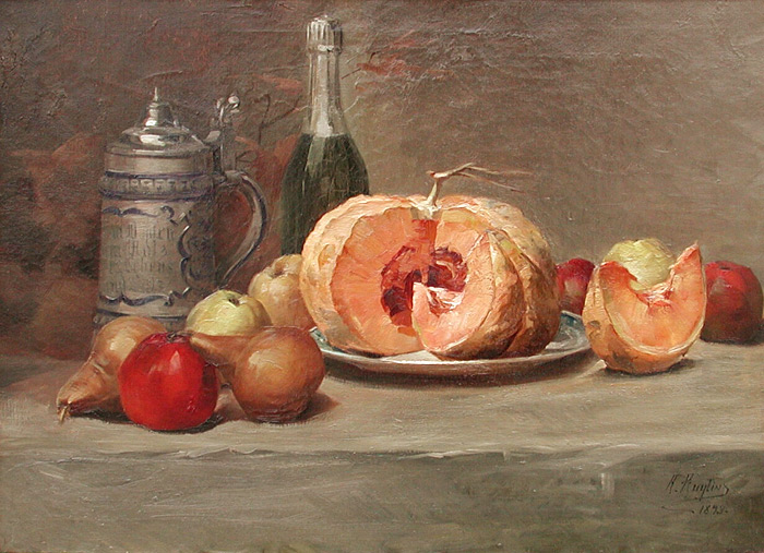 Still Life